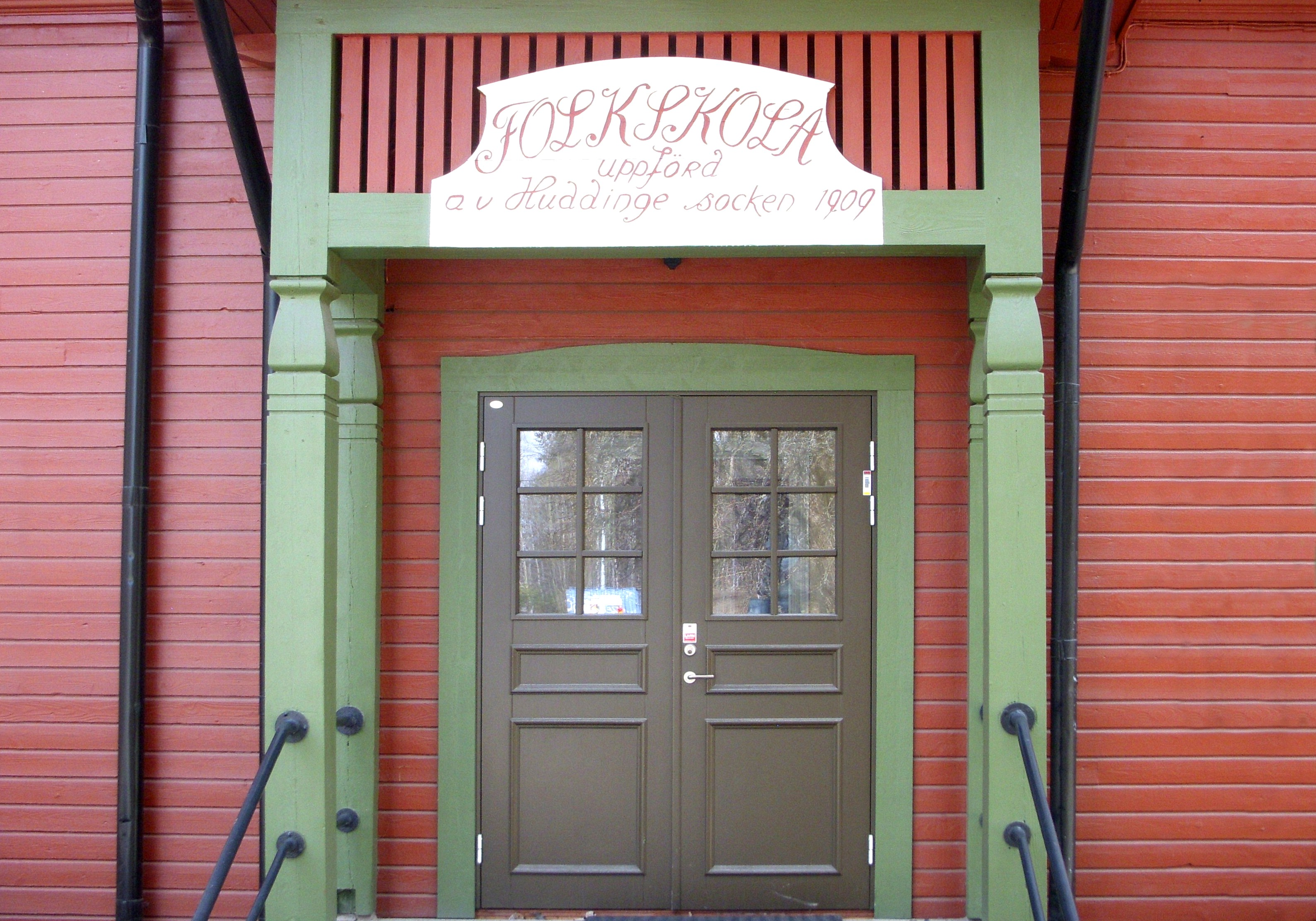 Beatebergs folkskola från 1909